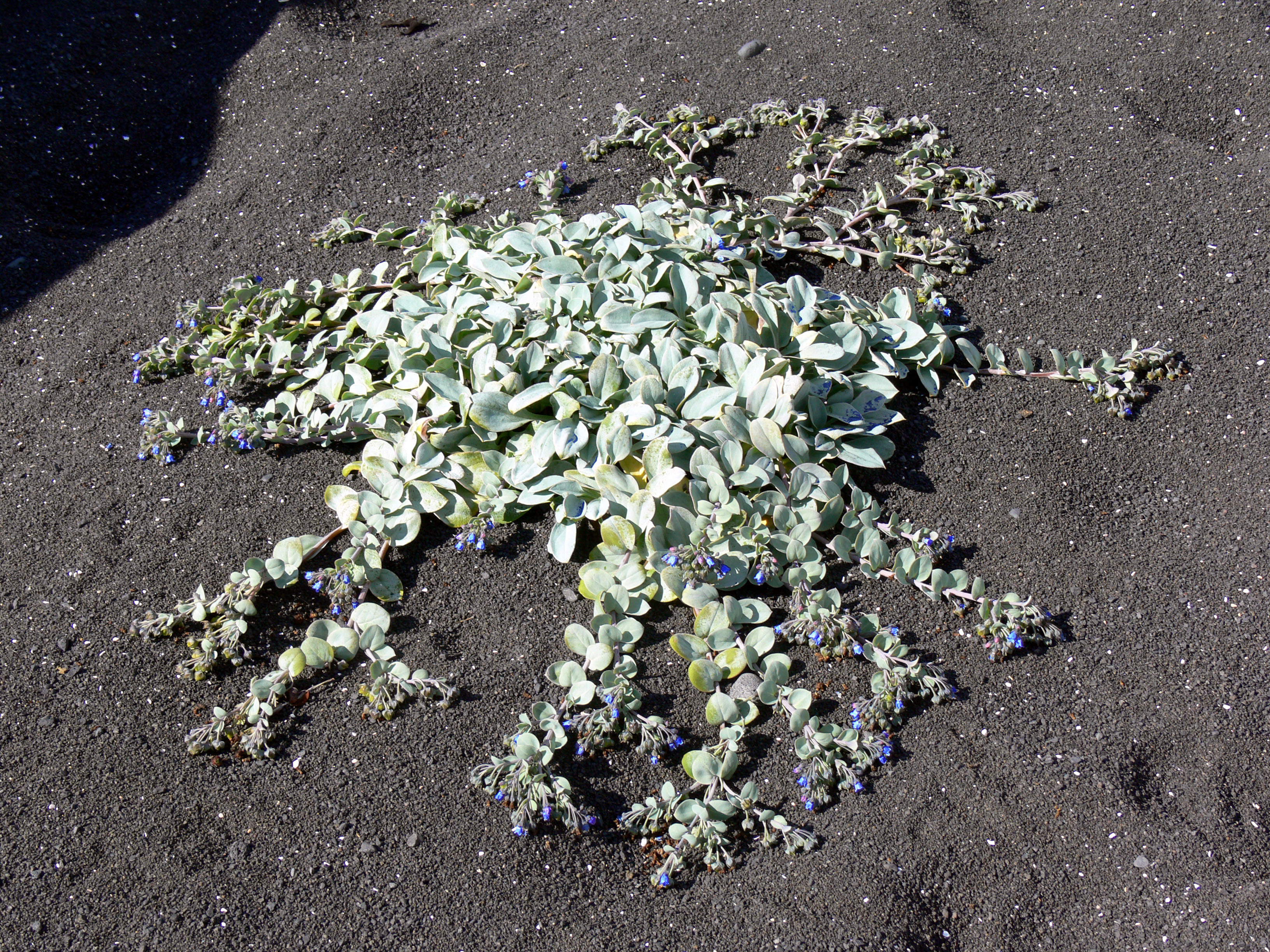 Mertensia maritima auf Reykjanes in Island